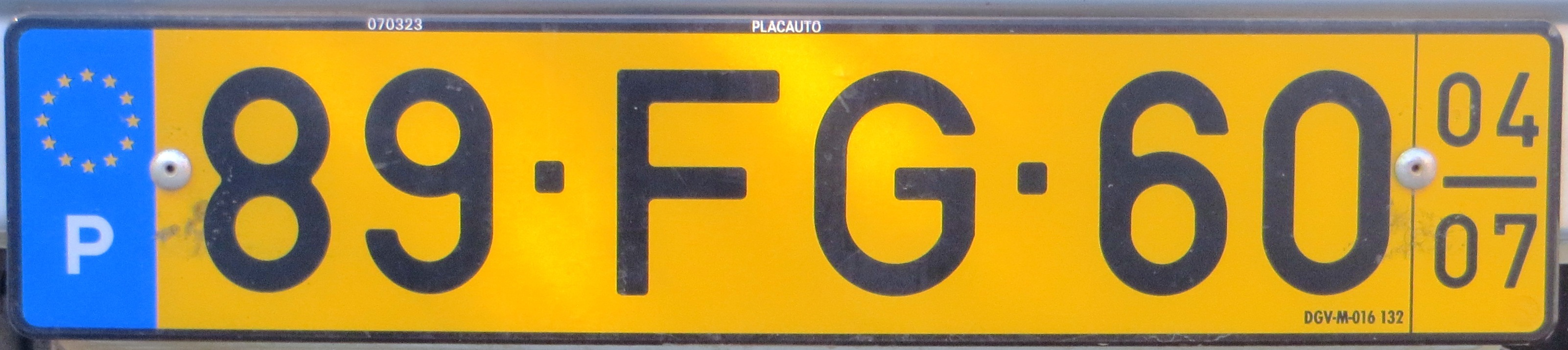 Gele kentekenplaat Portugal voor langzame voertuigen